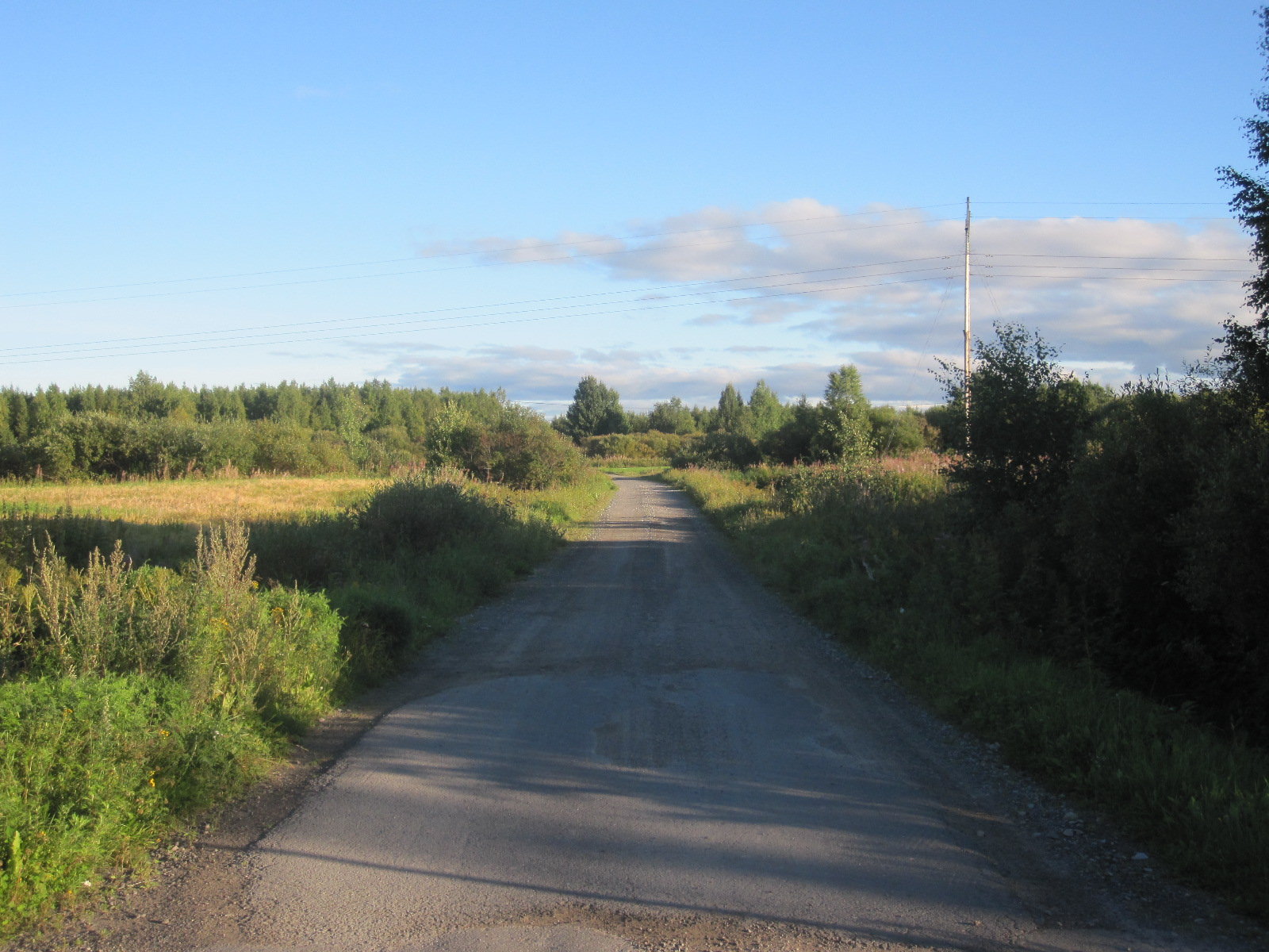 Näkymä Niittyrannantielle Kempeleen Helpikujan risteyksestä, Sarkkirannan suunnasta katsottuna.